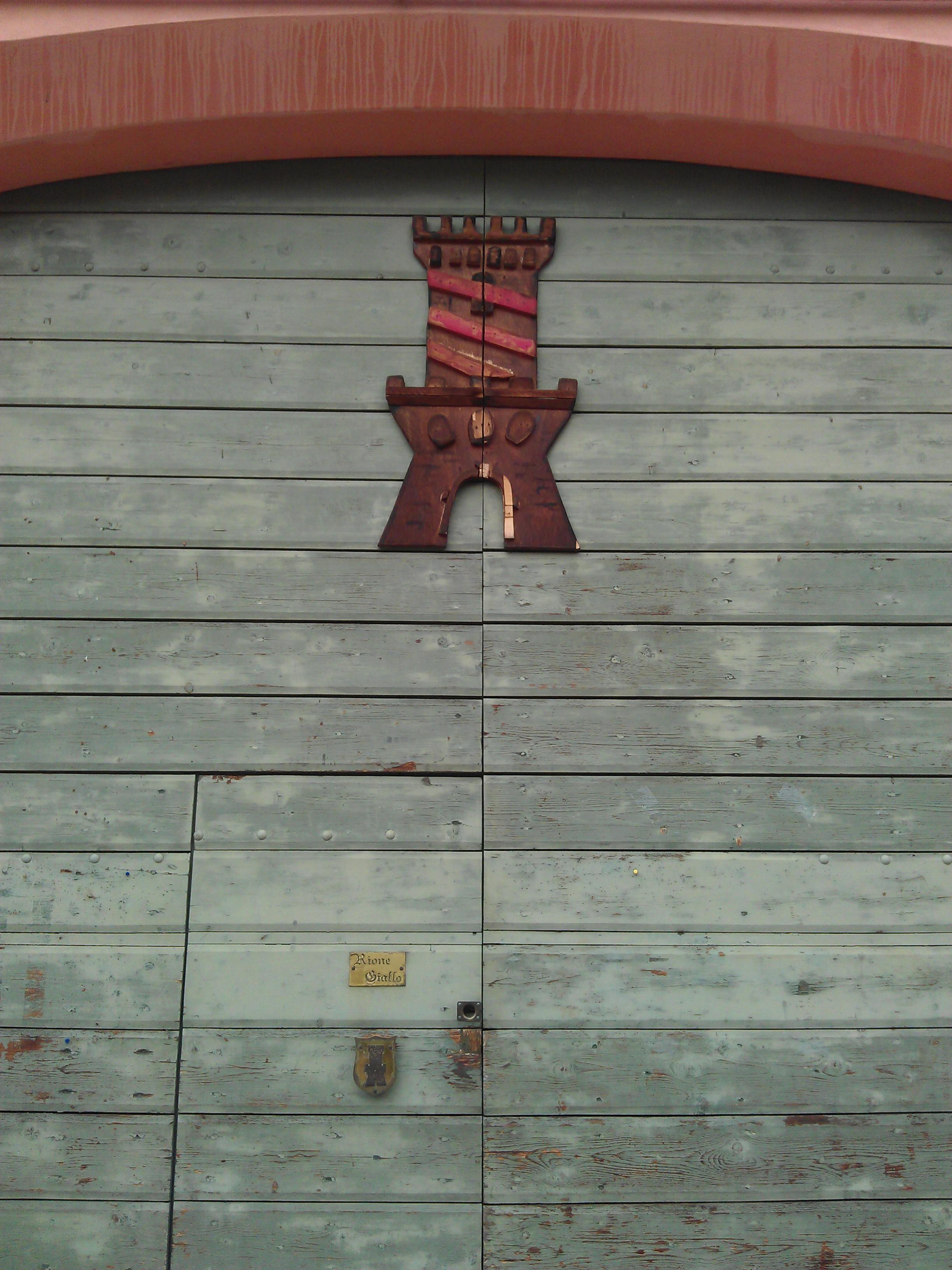 Portone della sede del Rione Giallo di Faenza con impresso lo stemma del rione raffigurante una torre con due ordini di merlature alla guelfa e fasciata tre volte in vermiglio.